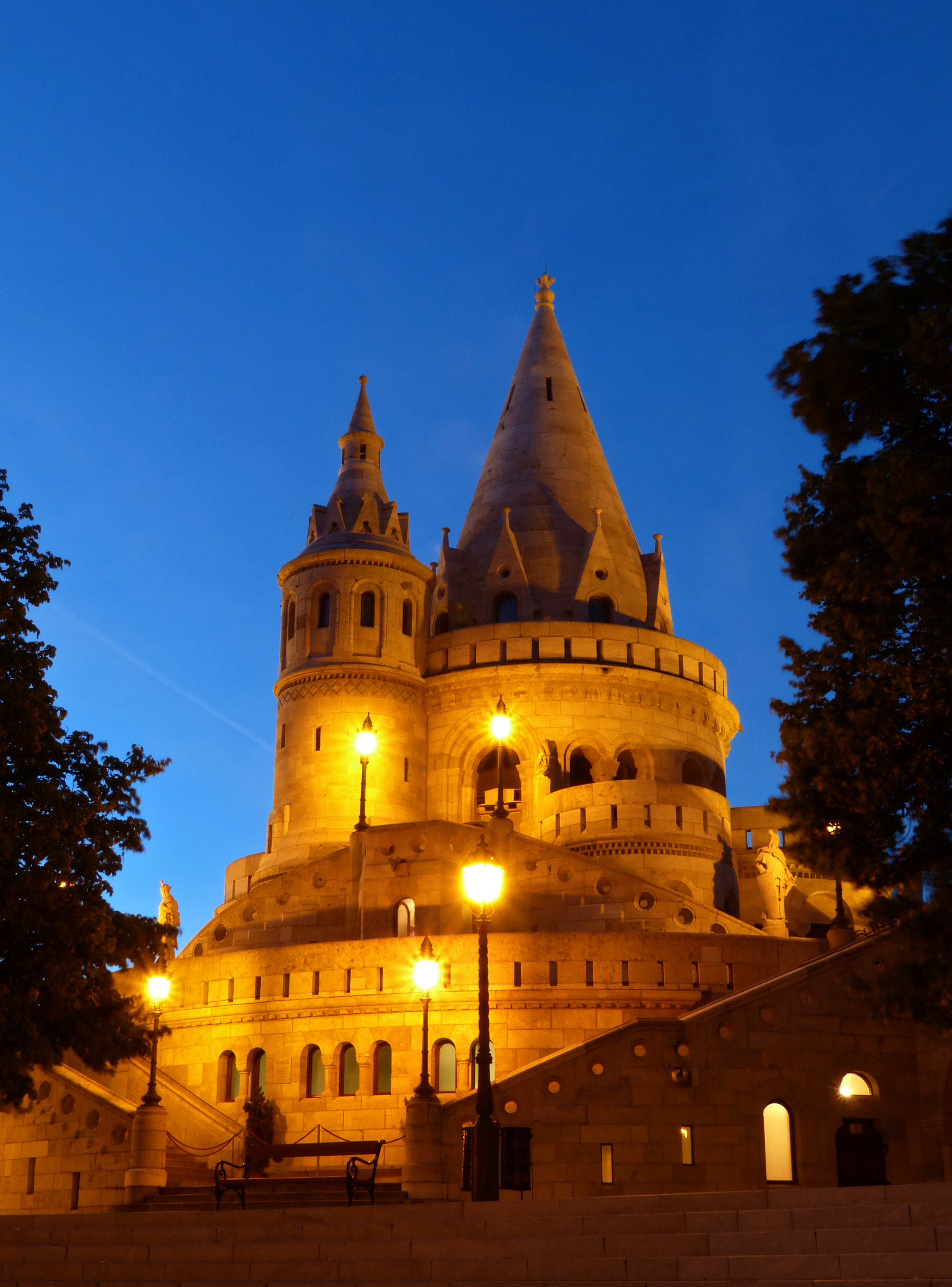 Fischerbastei in Budapest, Abendstimmung